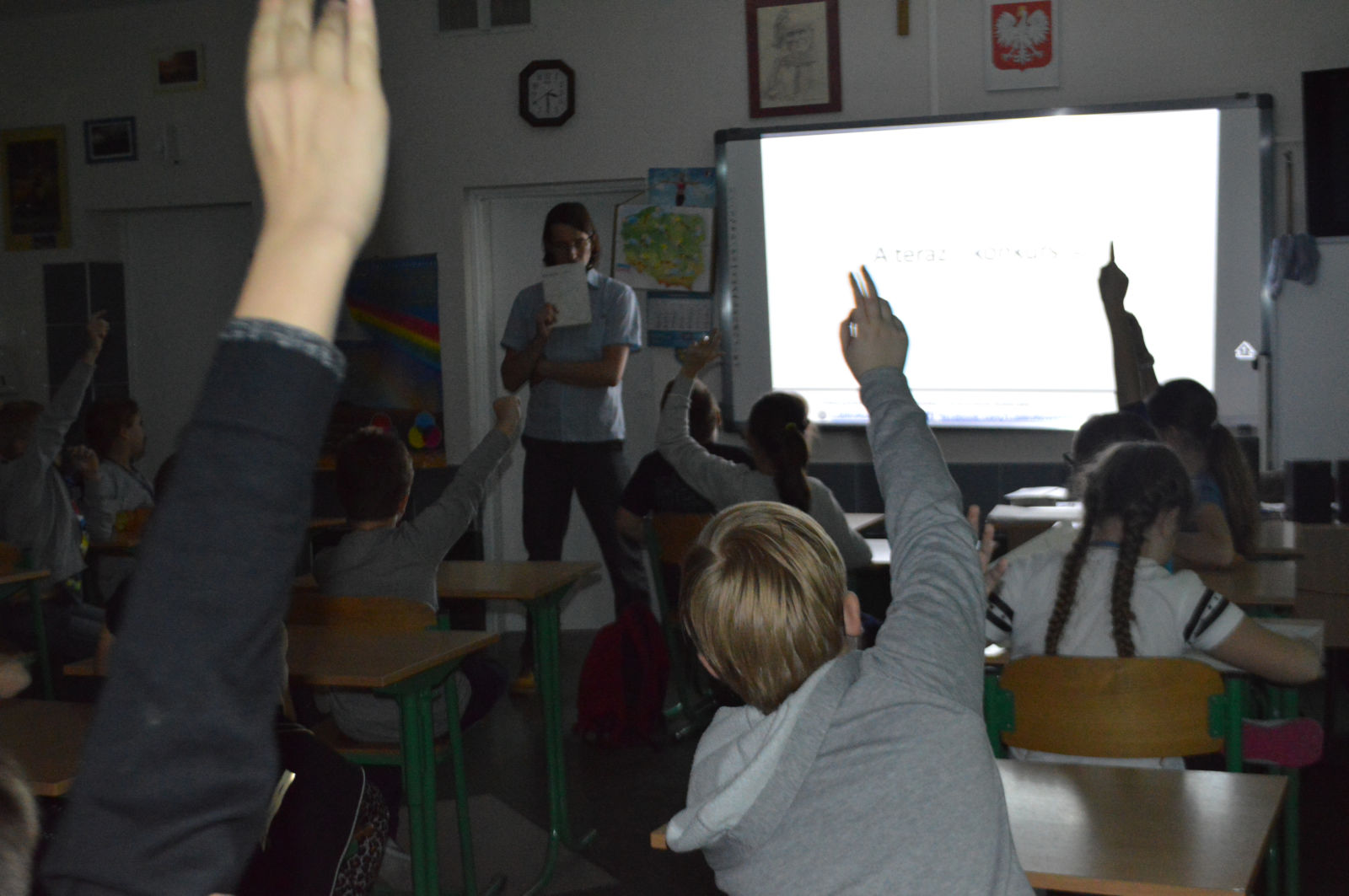 Szkolna teoretyczna edukacja rowerowa